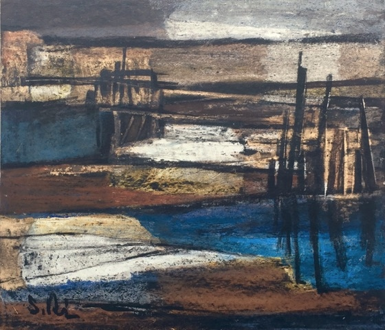 Expressionistische Landschaftsdarstellung, das Wattenmeer bei Sylt